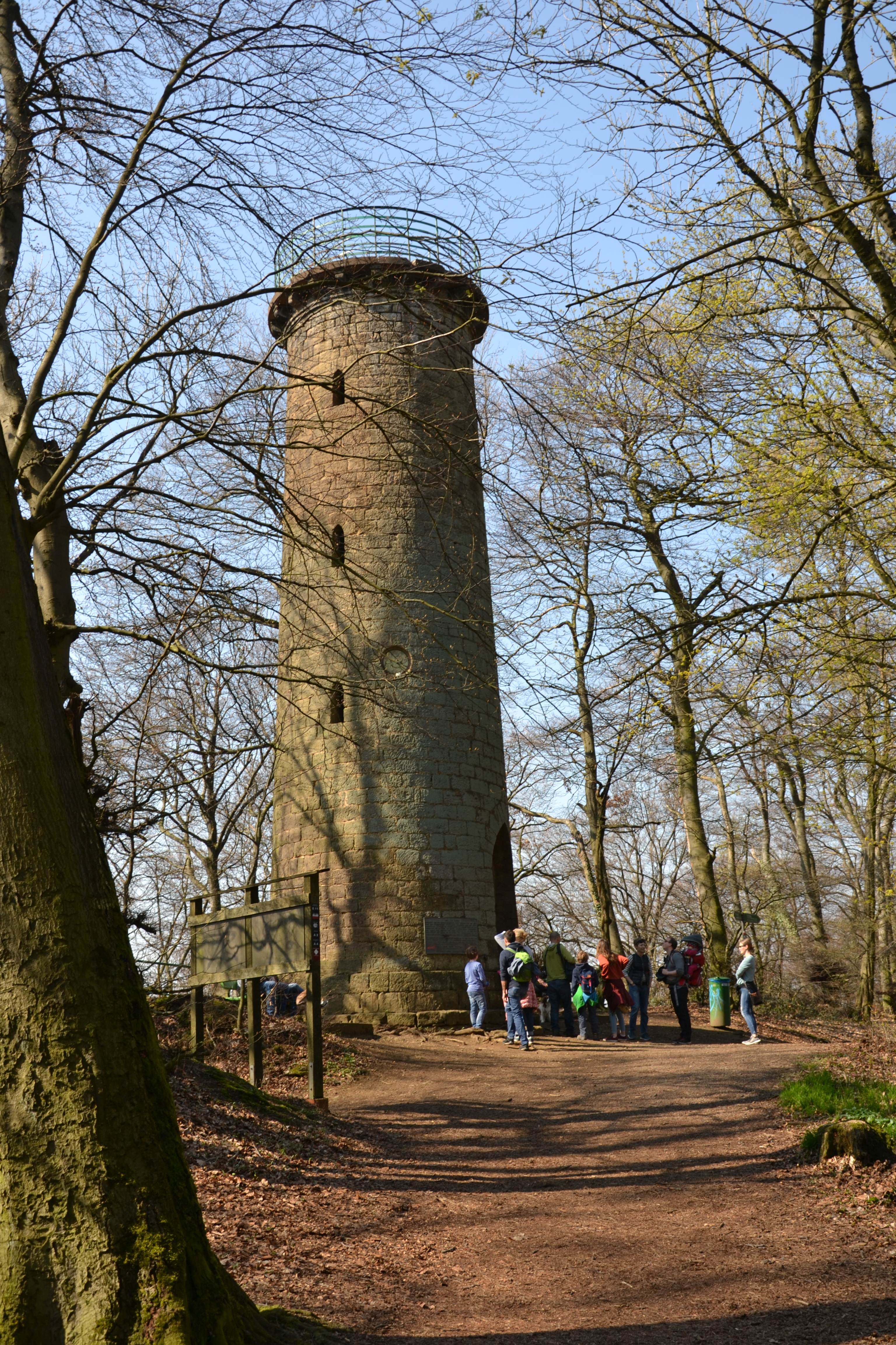 Der Moltke Turm auf dem Wiehengebirge nahe der ostwestfälischen Stadt Porta Westfalica.